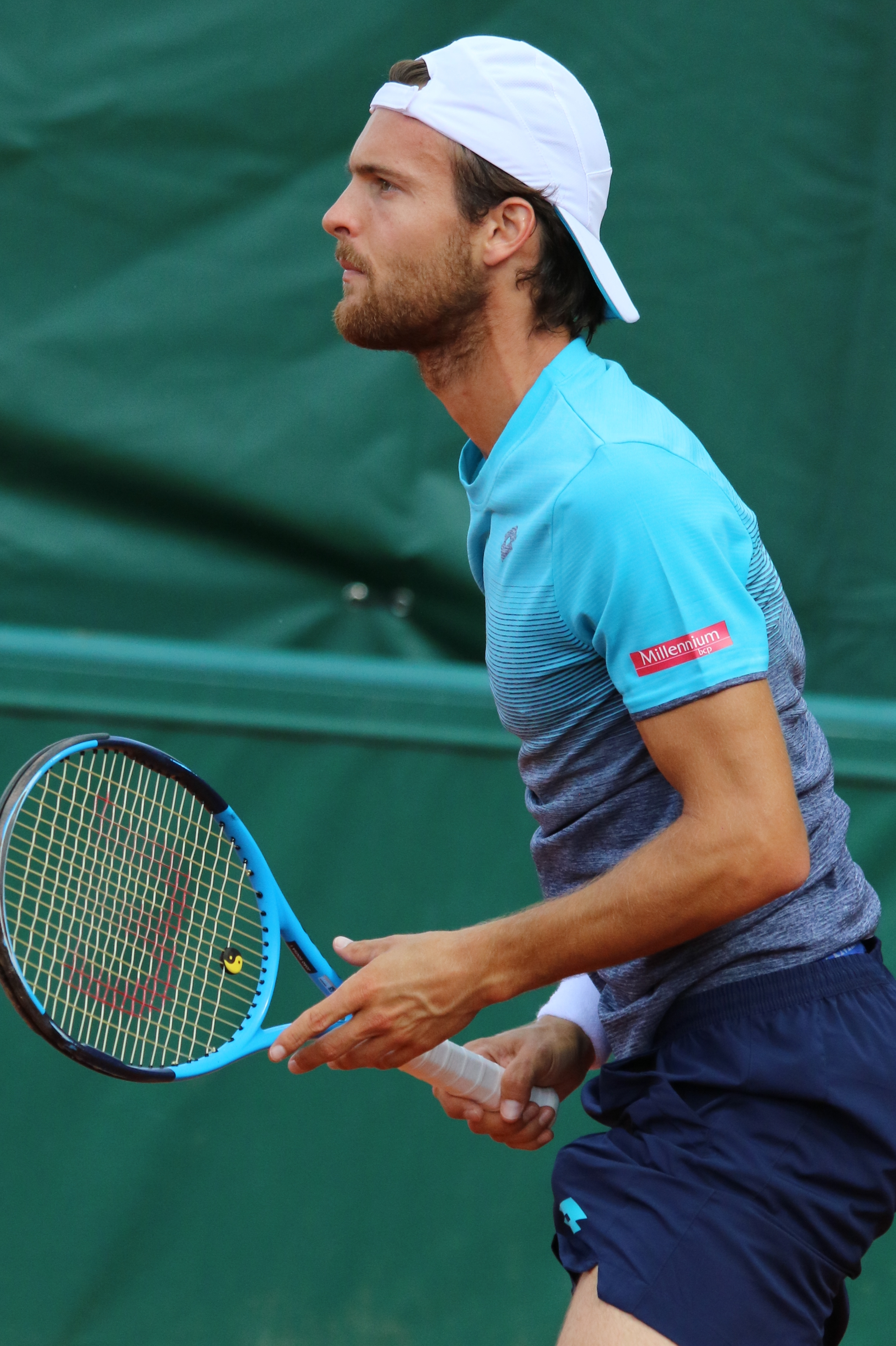 Sousa RG18 (4)